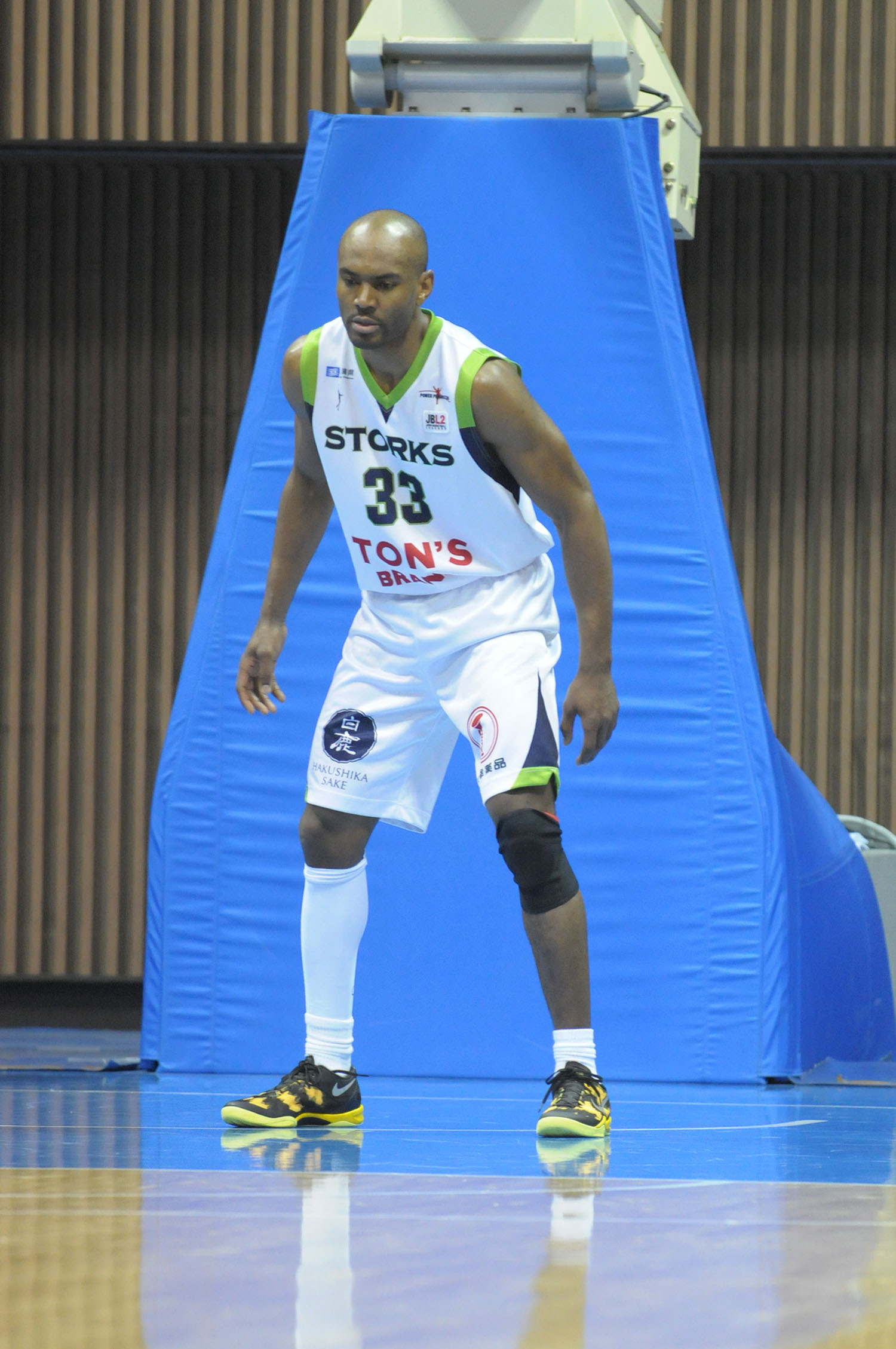 兵庫ストークス、ウィリアム・ナイト選手。代々木第二体育館で。